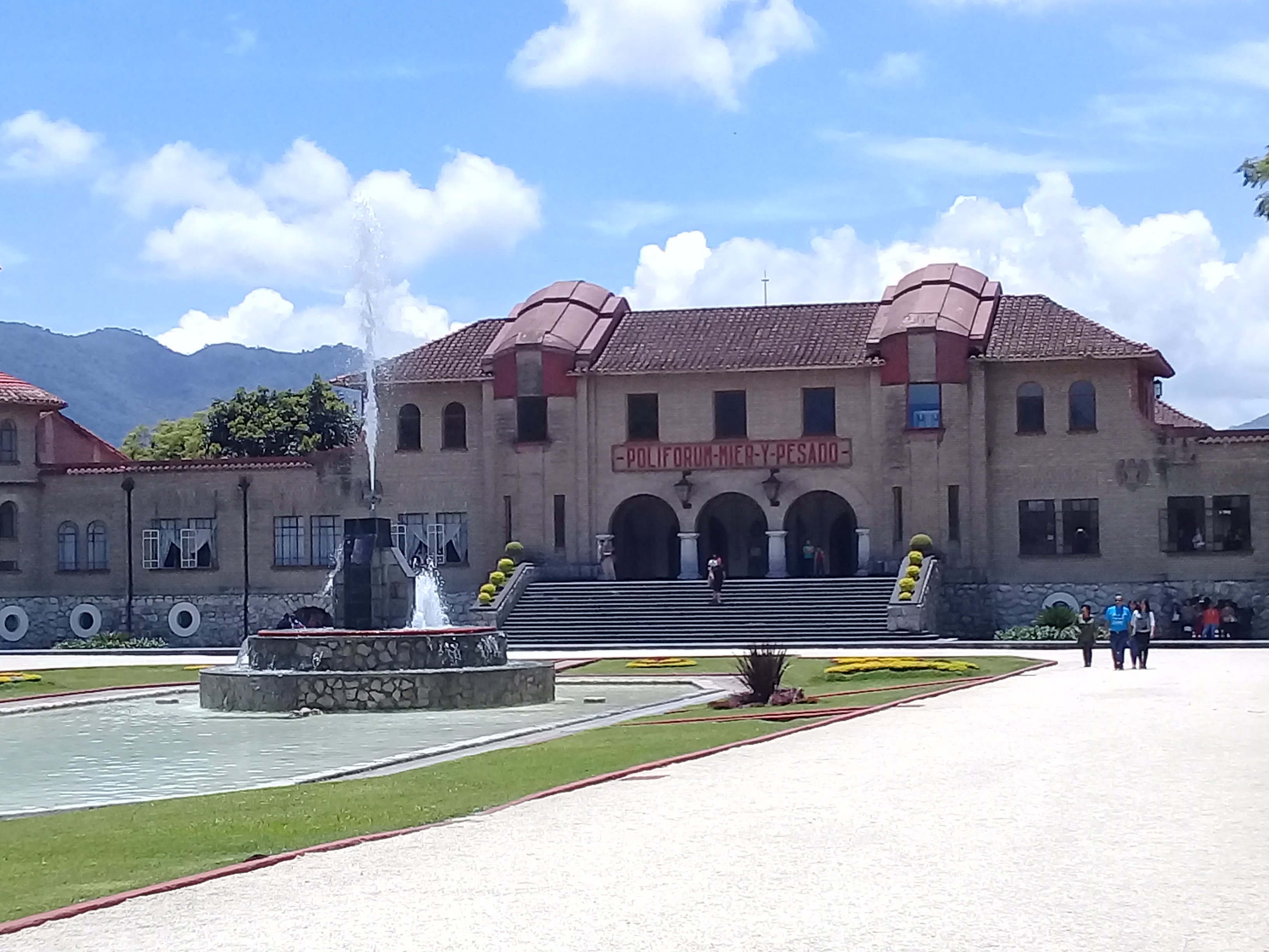 Poliforum Mier y Pesado, Orizaba, Veracruz 02